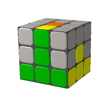 cubo Rubik Dibujo realizado por Josemanuel